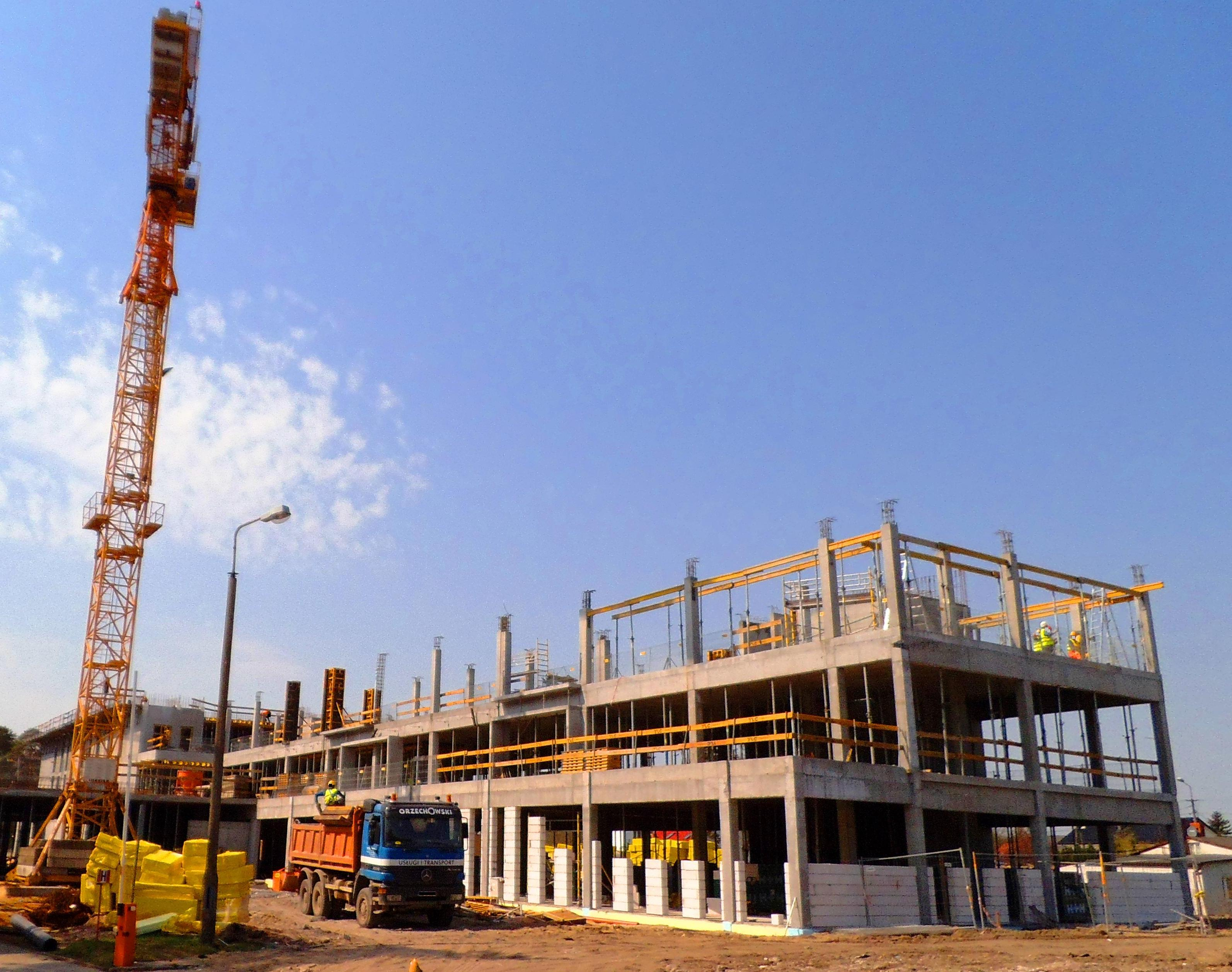 Budowa Szpitala Zakaźnego w Toruniu, kwiecień 2018 rok